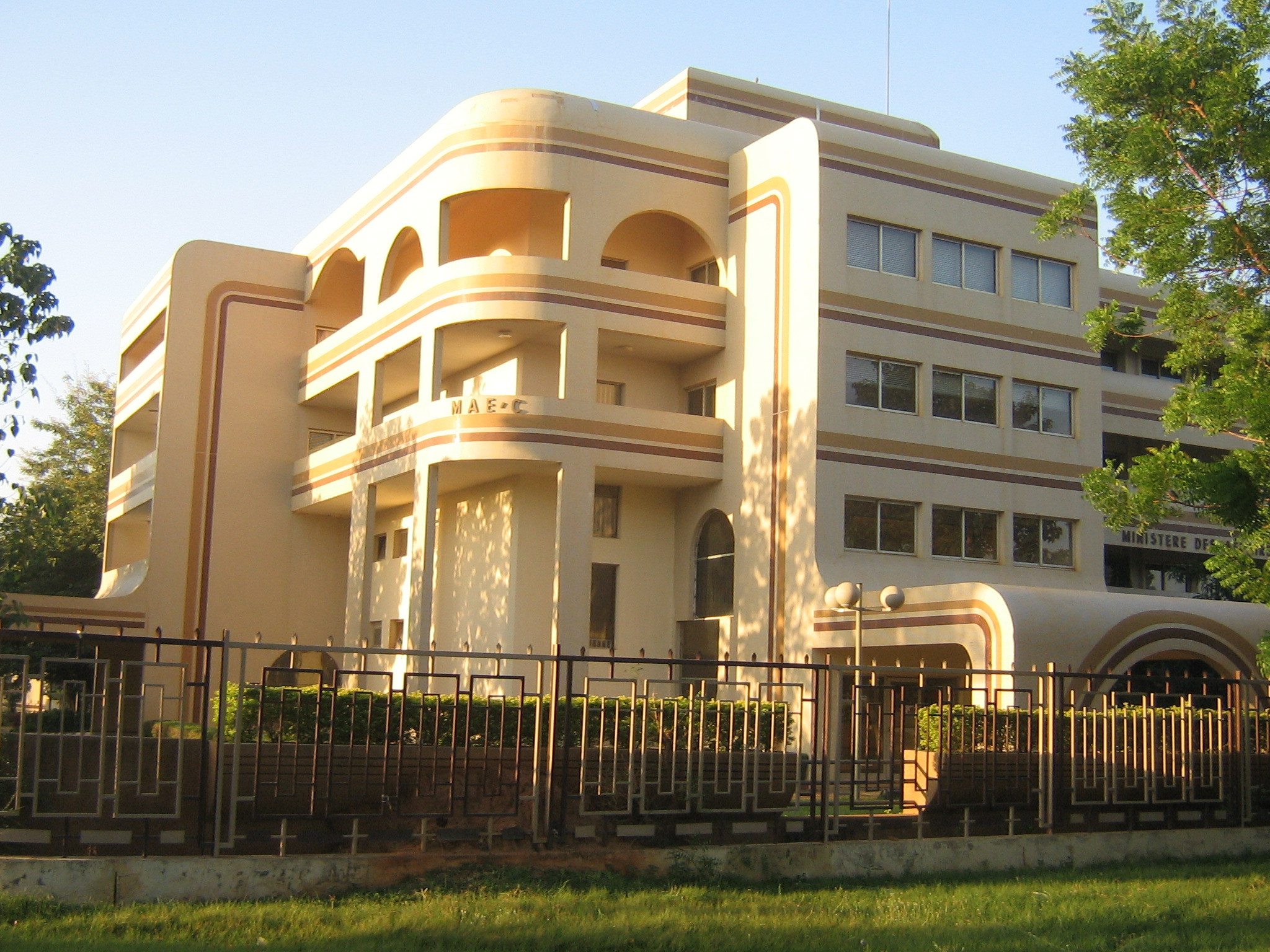 Bâtiment du Ministère des affaires Étrangères du Niger